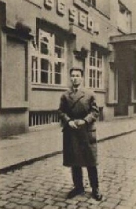 Iša Krejčí (1904-1968), český neoklasicistní skladatel a dirigent